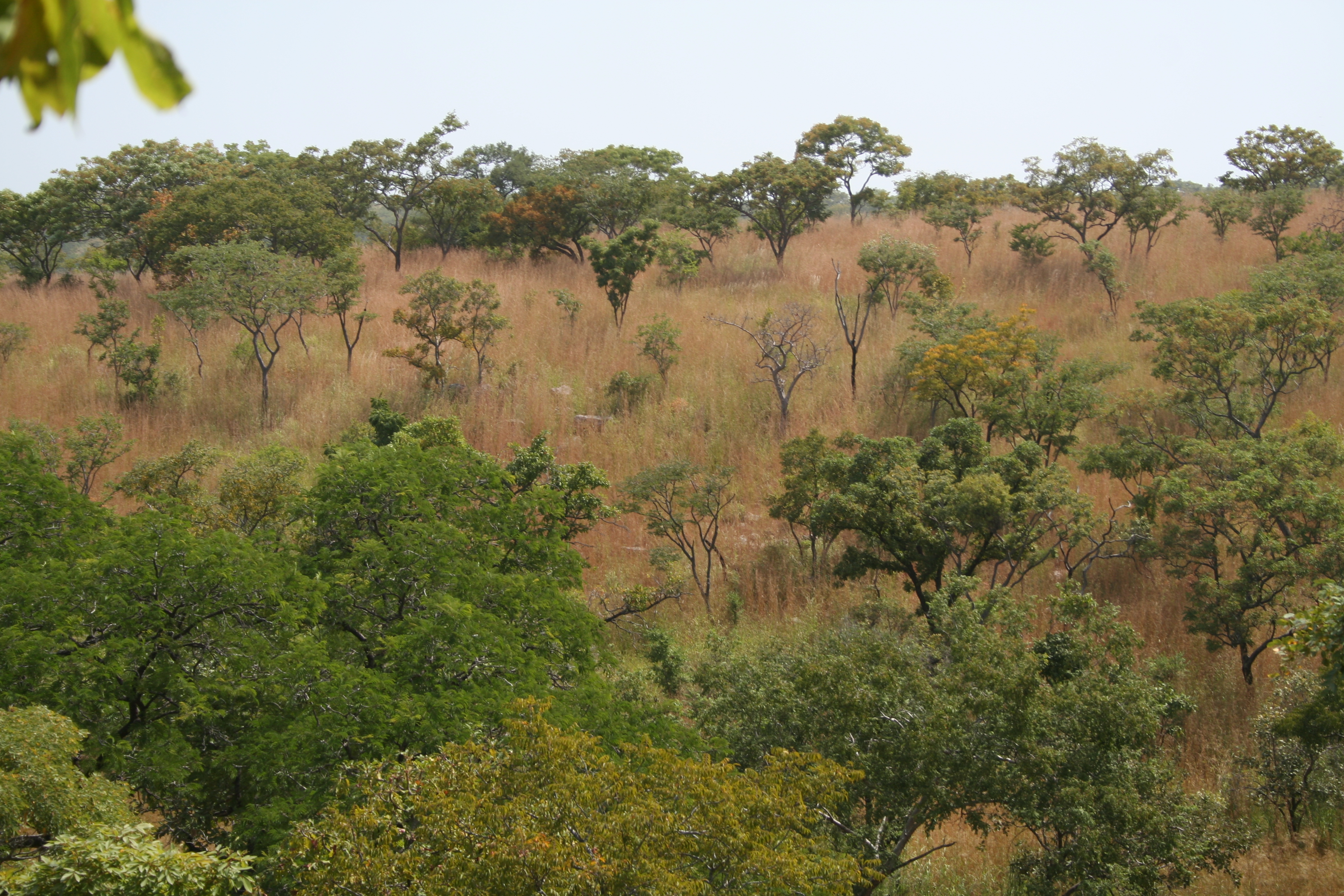 Tree savanna in Atacora mountains, Reserve partielle de la Kourtiagou, Burkina Faso